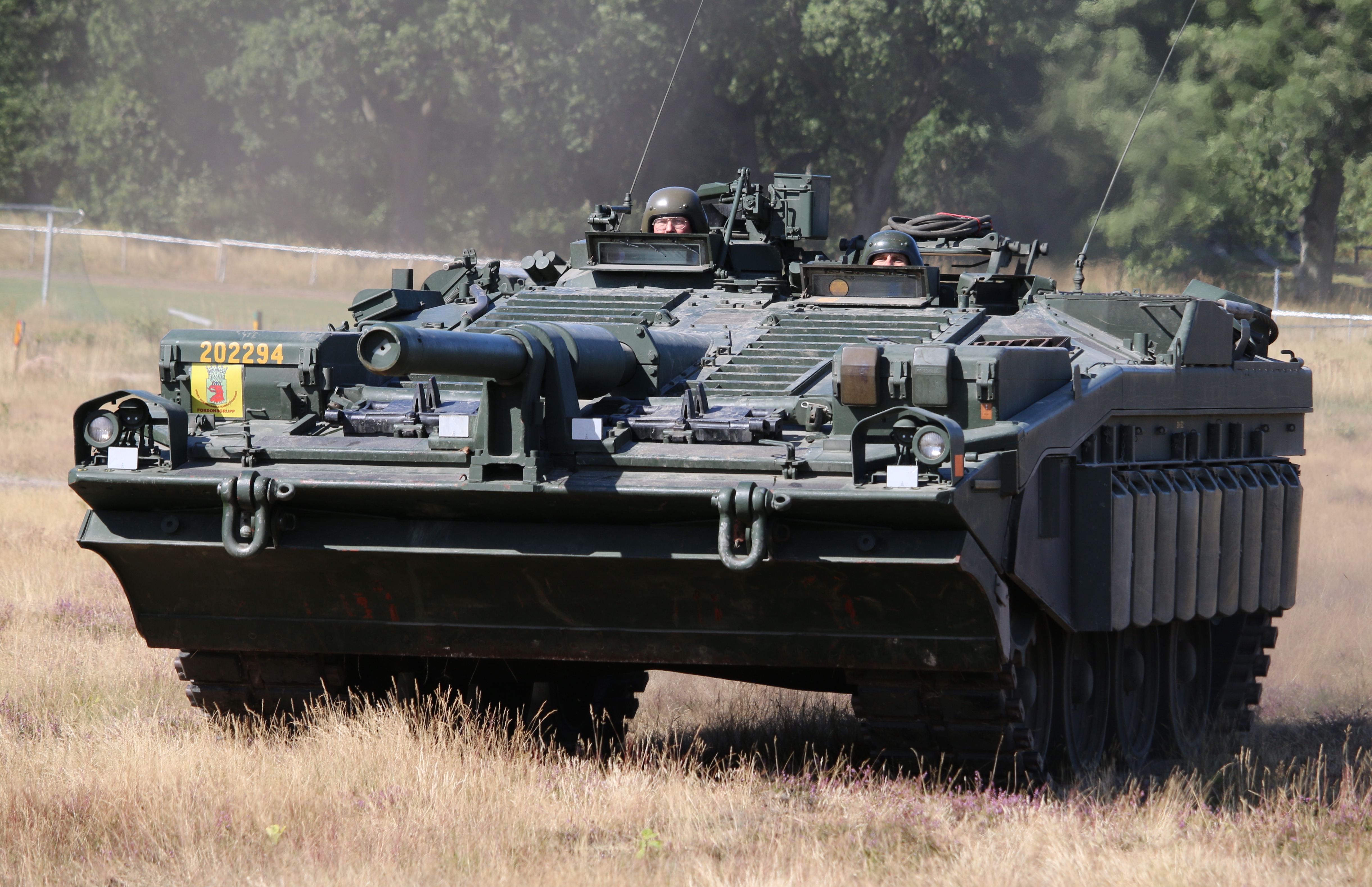 Stridsvagn 103 Revinge 2015